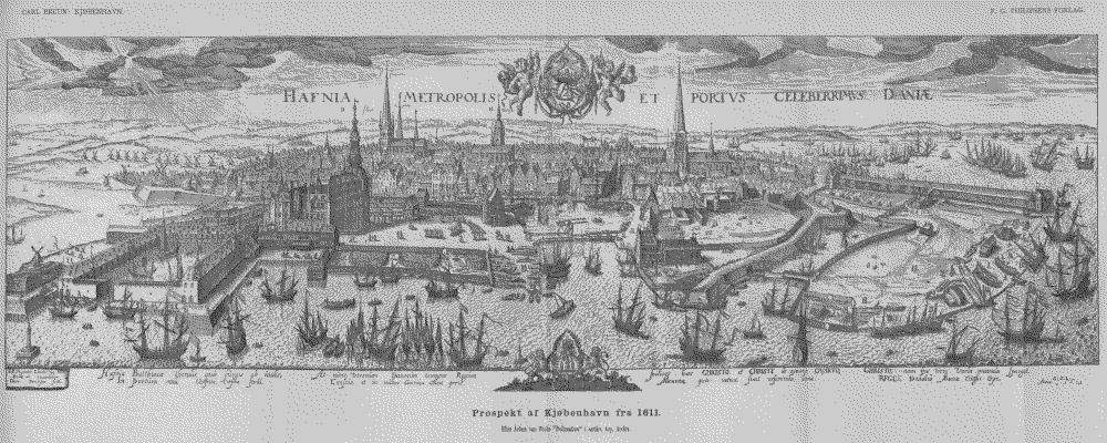 Prospekt av København utført av Jan Diricksen fra 1610 eller 1611 med Chr. IV.s og Anna Kathrines kronede navnechiffer over. Stikket er utført etter et maleri av Johannes van Wick. Originalmaleriet kjennes ikke lenger. Fra Carl Bruuns (1846-99) bok om København som kom ut i 1887